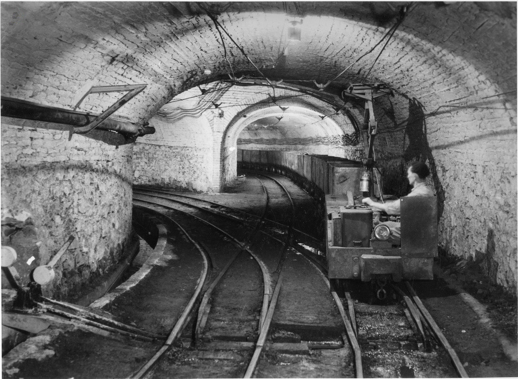 Grande Miniera di Serbariu: galleria di servizio.